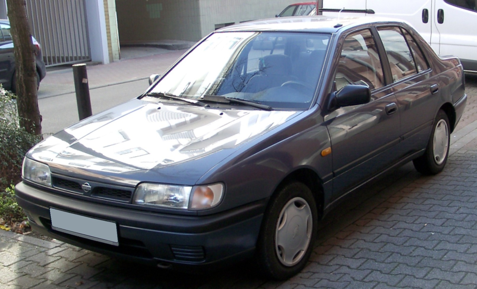 Nissan Sunny